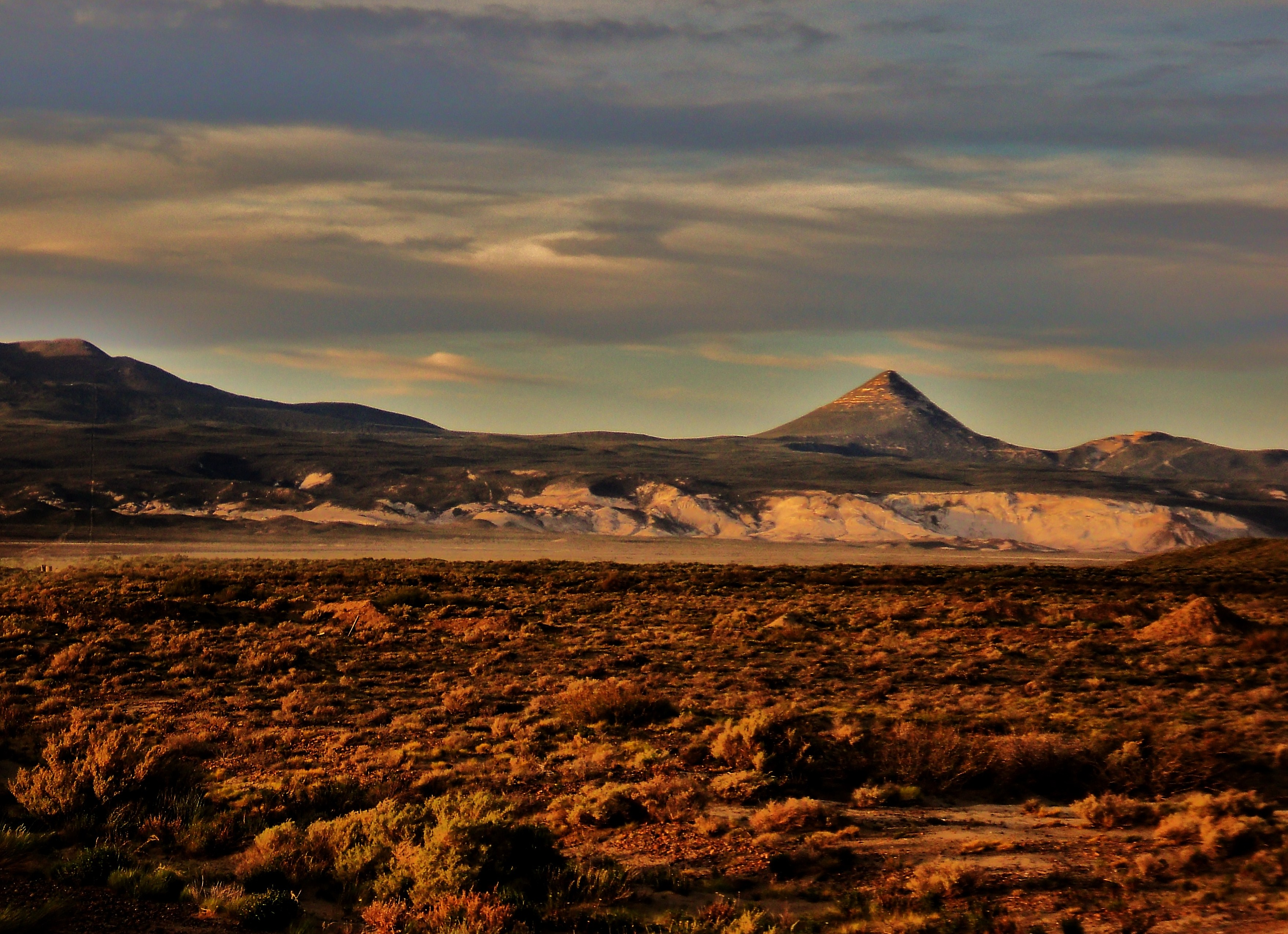 El pico rodeado de elevacioens menores y de frente a la pampa salamanca